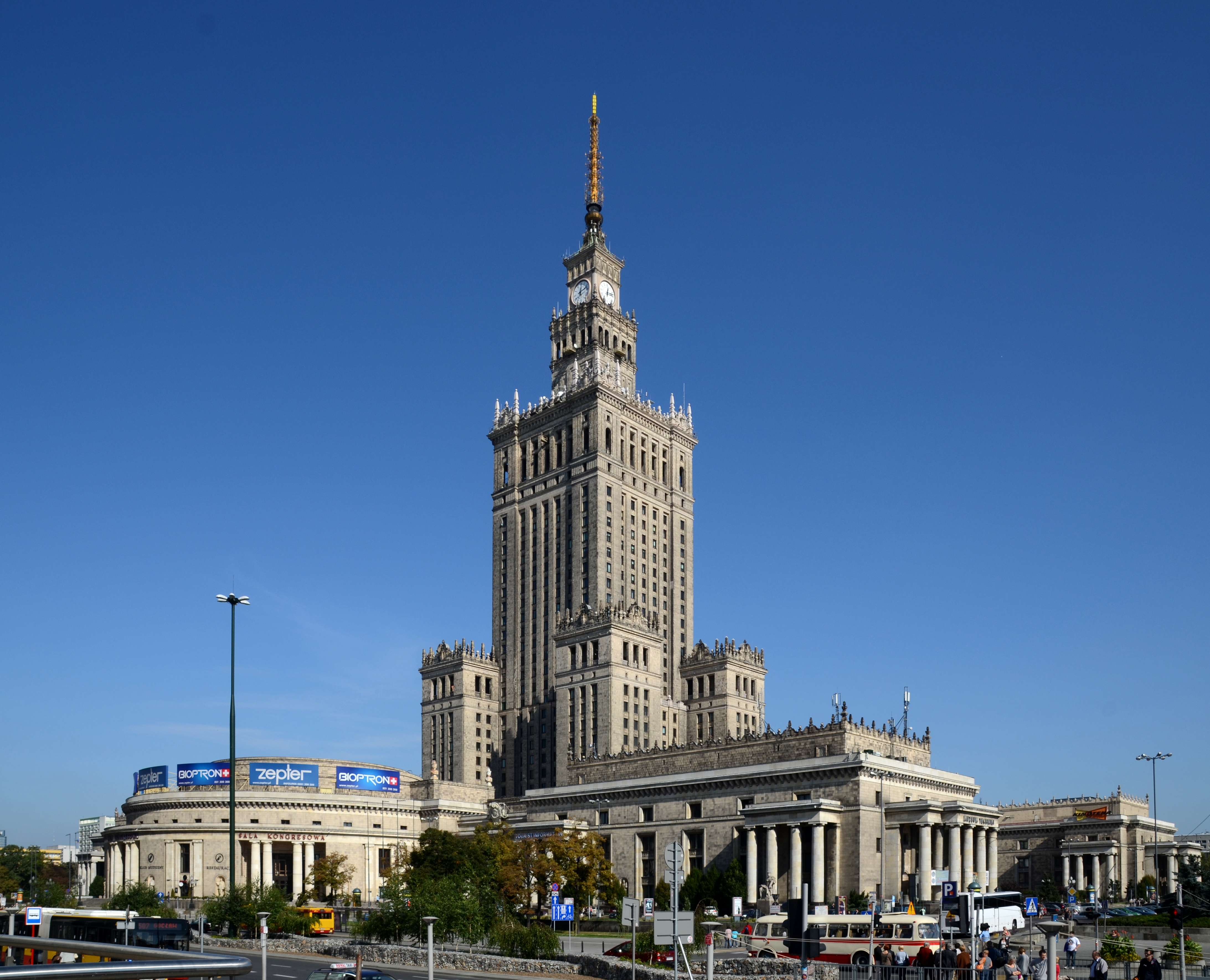 Pałac Kultury i Nauki w Warszawie widziany spod Dworca Centralnego.